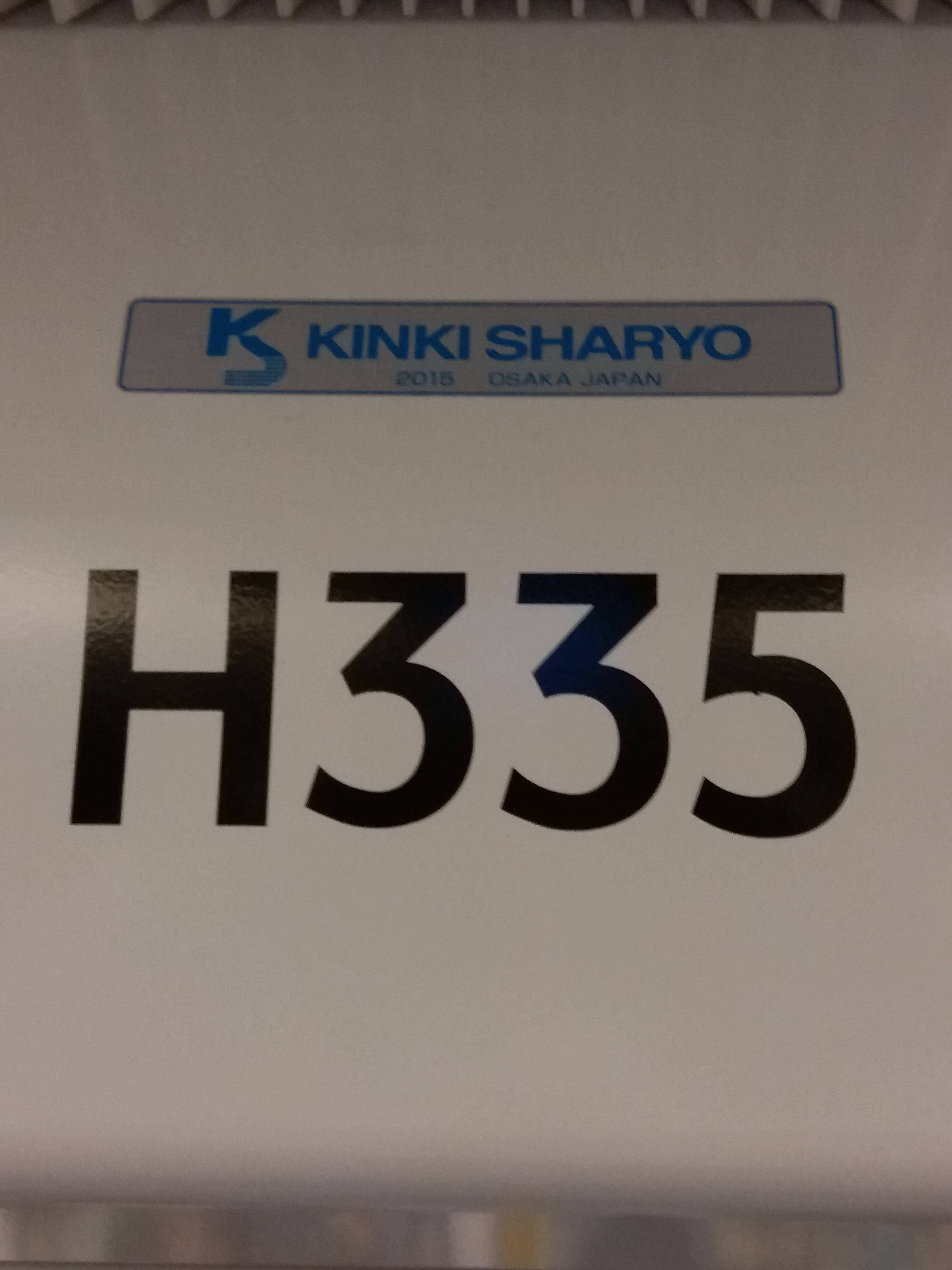 中文（香港）: 日本近畿車輛製港鐵SP1900,SP1950,KRS991,1151型列車標識